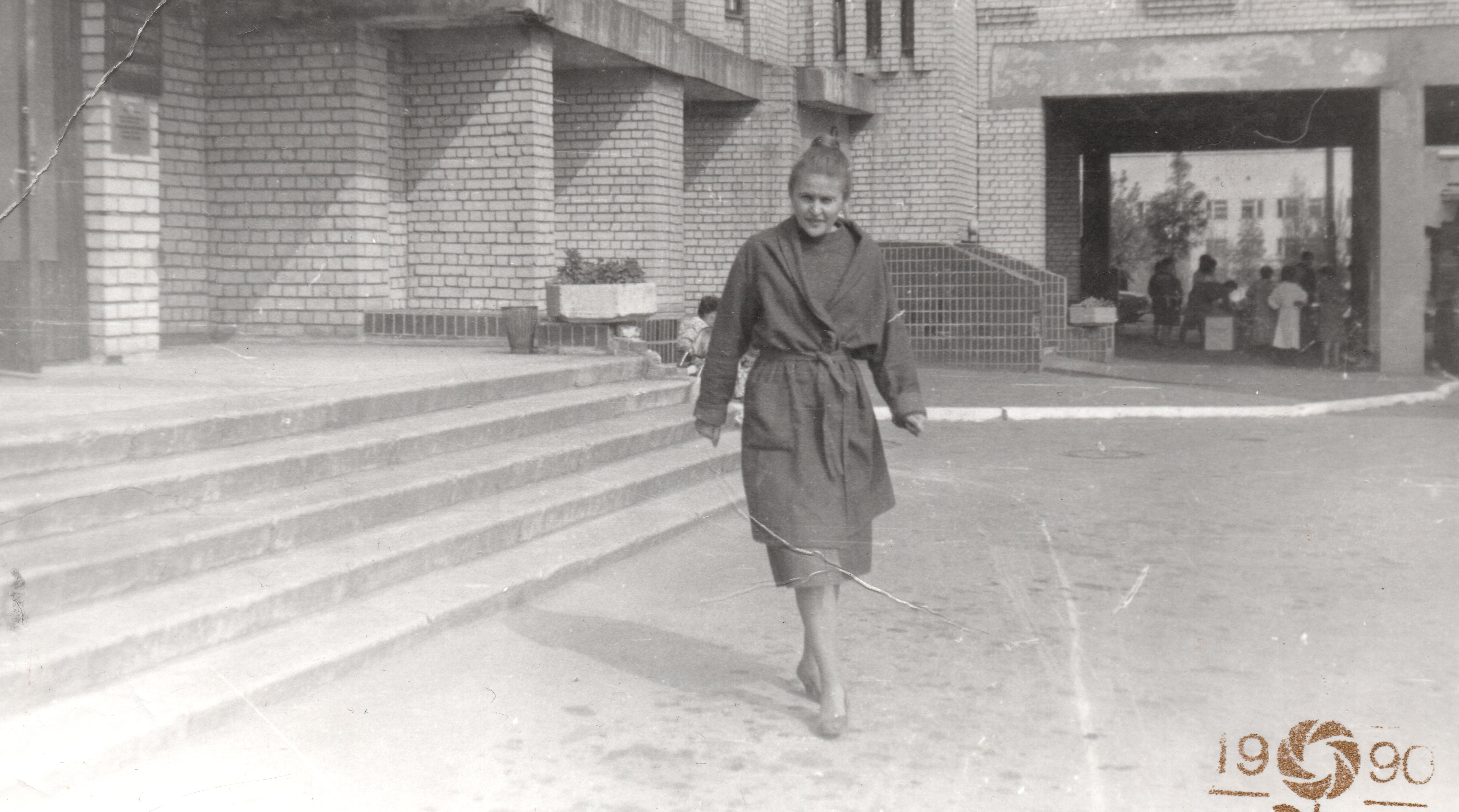 Перший день на роботі Падалко Людмили Іванівни головним лікарем Дніпропетровського обласного перинатального центру